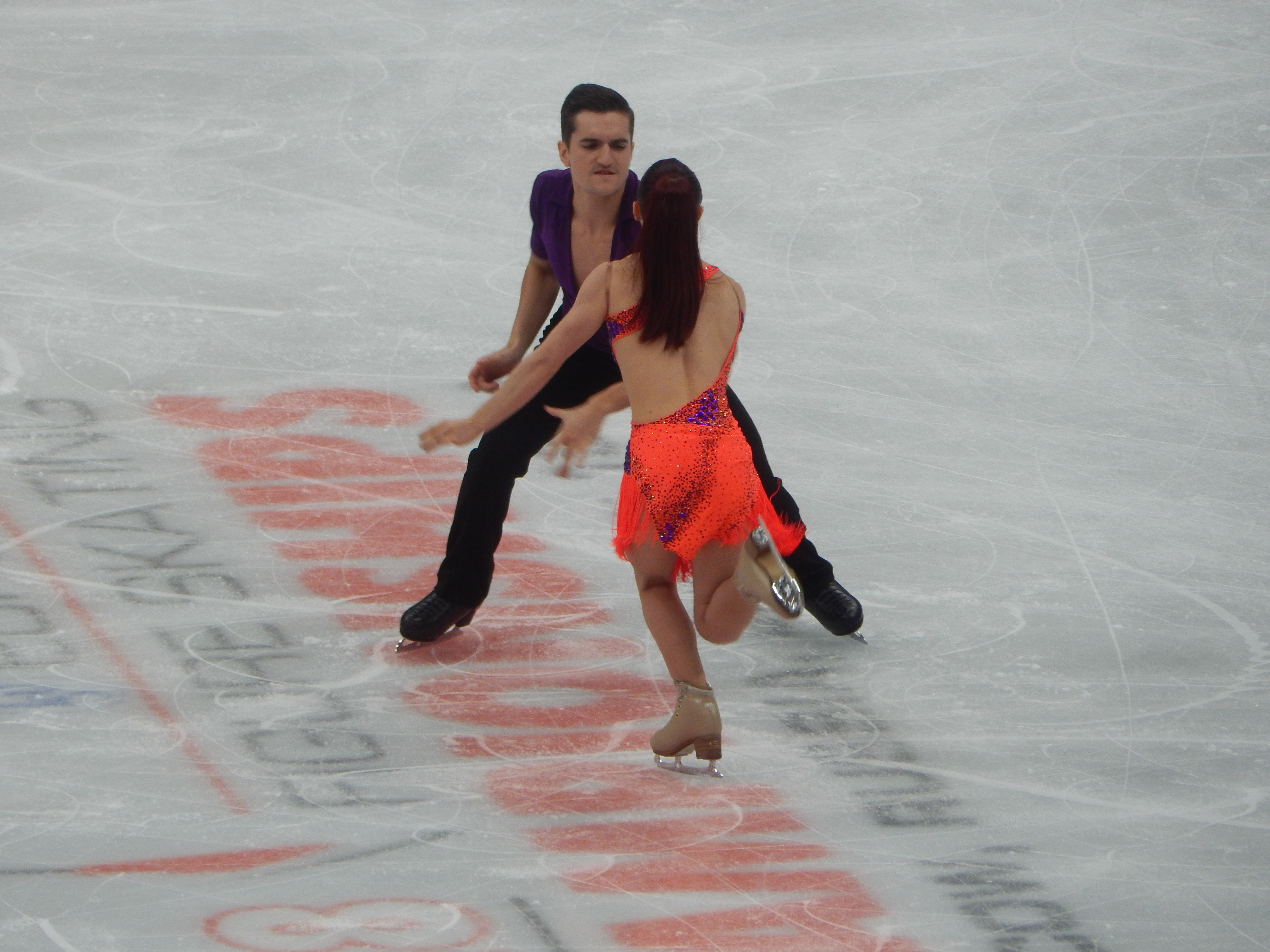 Чемпионат Европы по фигурному катанию 2018 в Москве. Третий день соревнований (19 января). Танцевальная пара из Франции Мари-Жад Лорио и Ромен Ле Гак